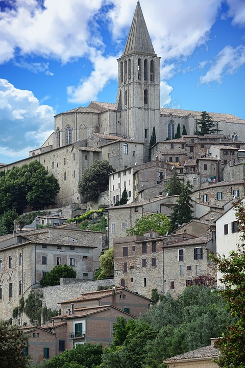 Il Tempio di San Fortunato a Todi e una panoramica del centro storico. Le notizie sulla costruzione di tale chiesa risultano antecedenti al 1198.